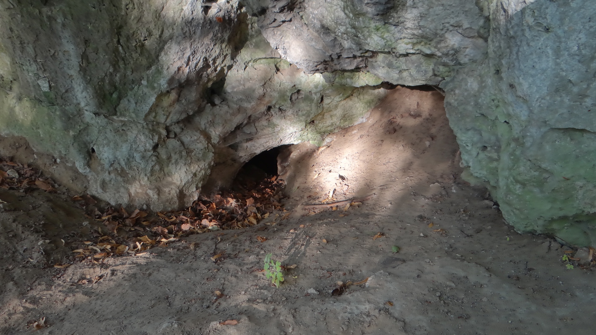 Schronisko przy Ziemi w sklae Oczko w Parku Jurajskim między smoleniem i Złożeńcem na Wyżynie Częstochowskiej